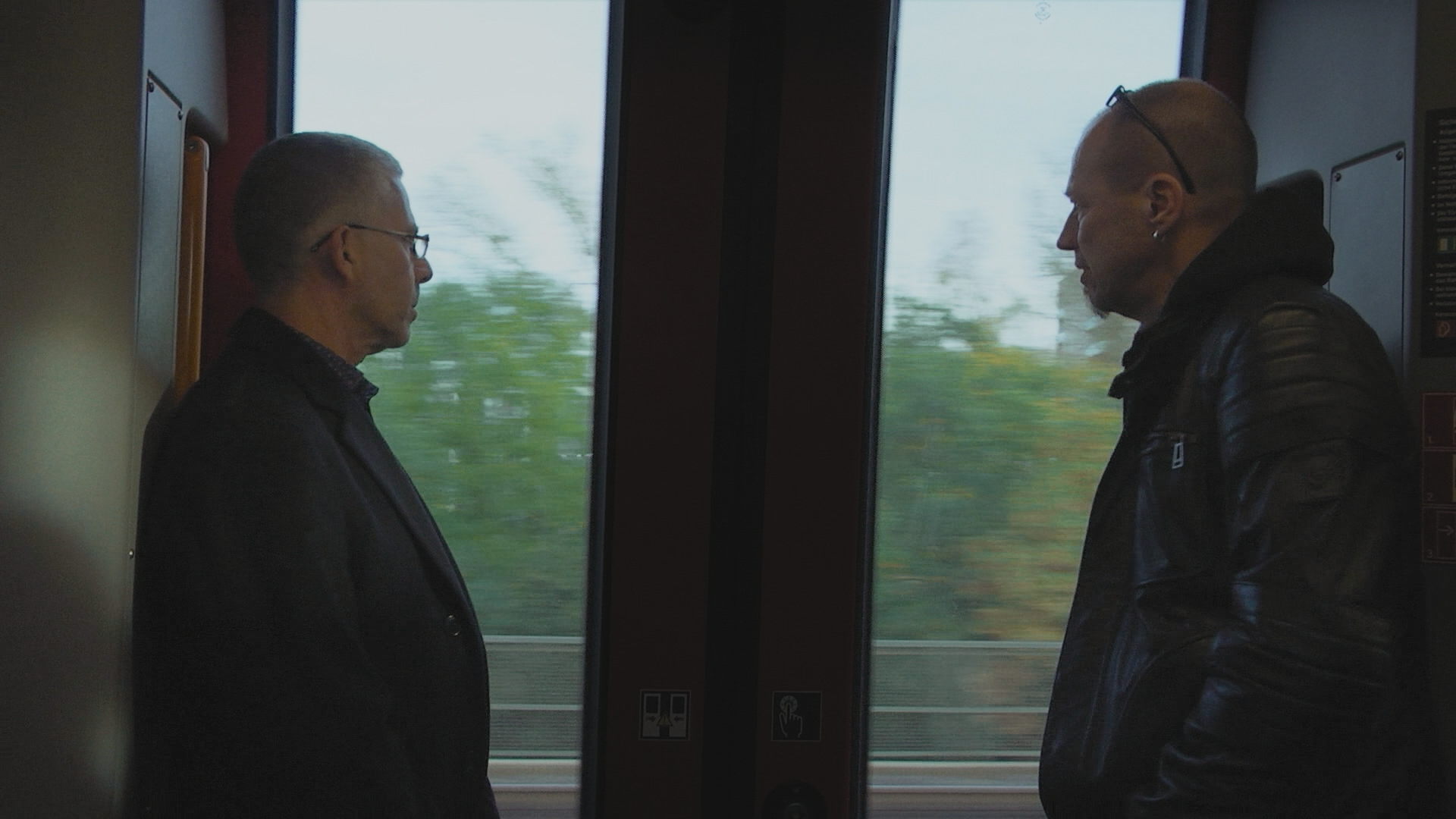 פריים מתוך הסרט אתה מת רק פעמיים. (2018) במאי: יאיר לב